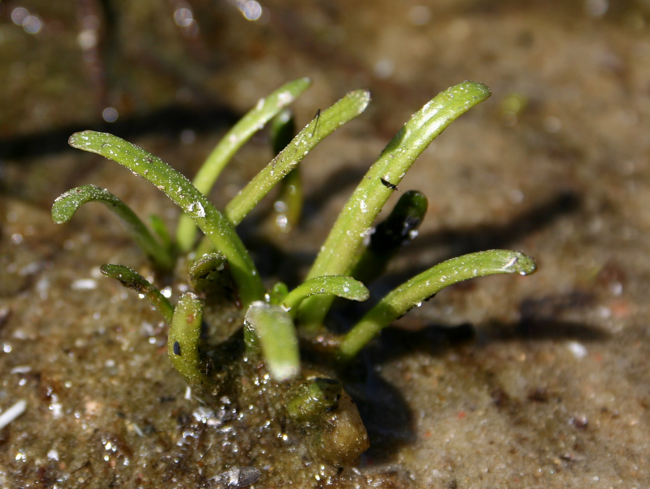 Park Narodowy Bory Tucholskie, liście lobelii jeziornej